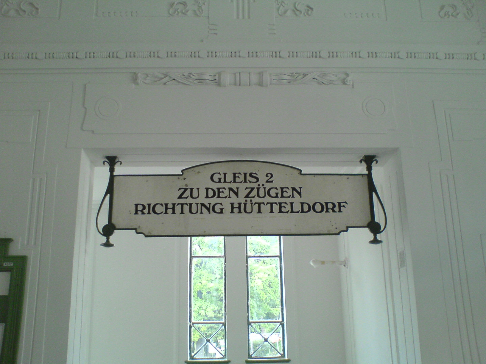 Hinweisschild im Wiener U-Bahnhof Hietzing